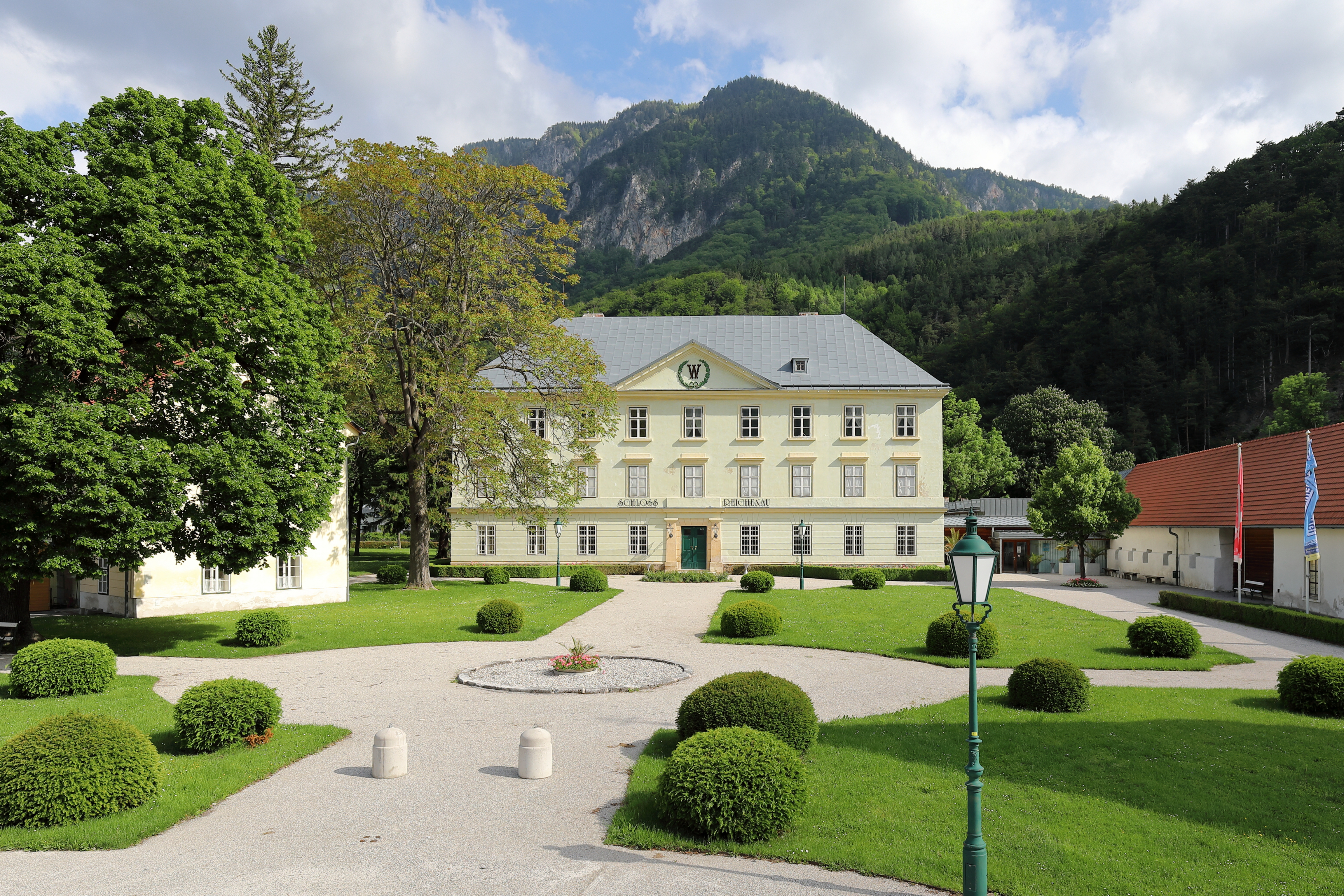 Südansicht des Schlosses Reichenau in der niederösterreichischen Marktgemeinde Reichenau an der Rax.Eine dreiflügelige Anlage mit mächtigem Eckturm im Nordwesten. 1829/30 wurde nach Plänen von Jacob Aigner das Schloss prägend umgebaut und Zubauten errichtet. Unter anderem wurde der dominierende Eingangstrakt im Süden unter Belassung der Fundamente neu errichtet. Im Hintergrund der Feichtaberg (1381m).